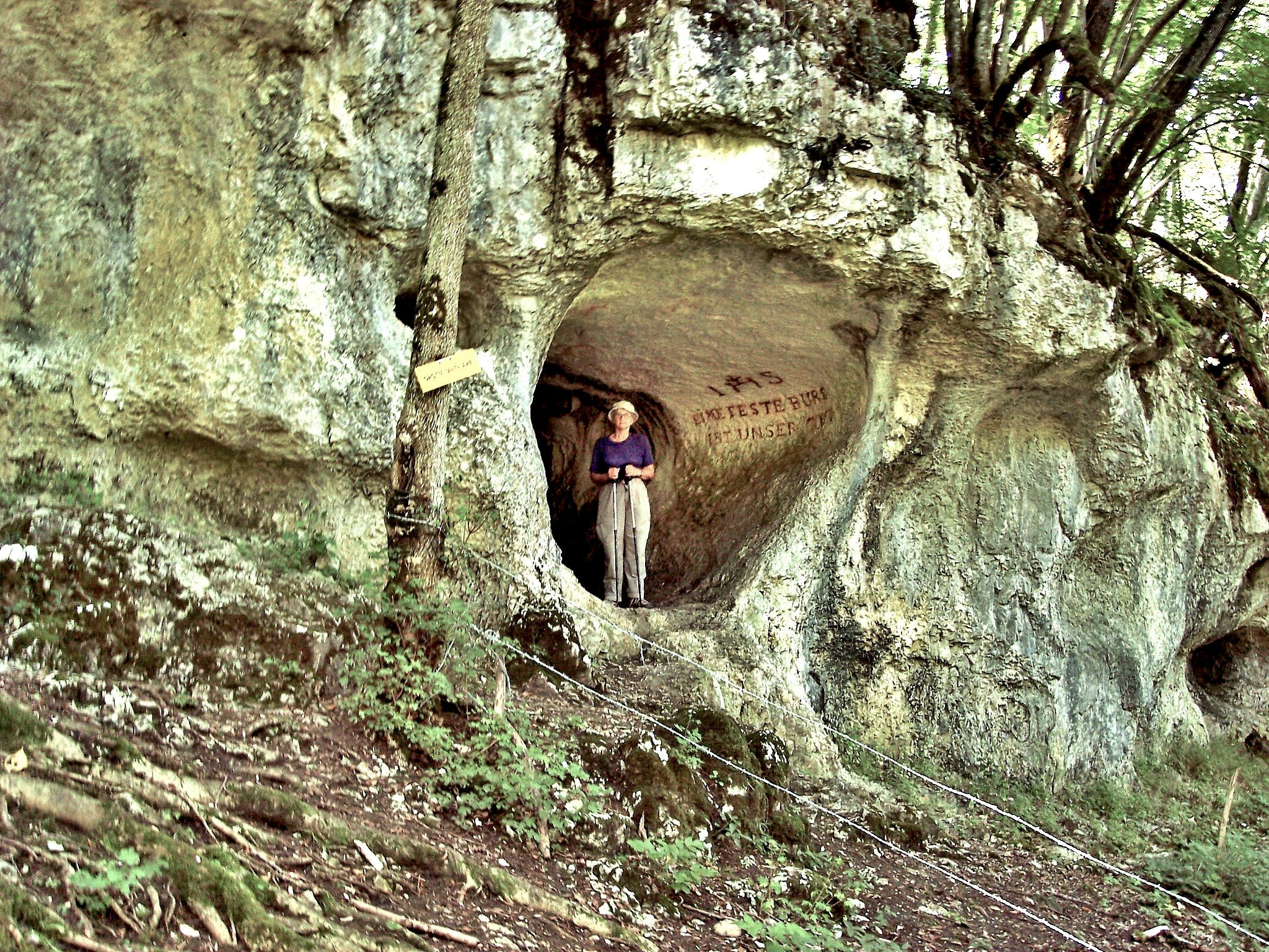 Grotte de tante Airie. Dans le vallon sous le village de Blamont. Doubs.